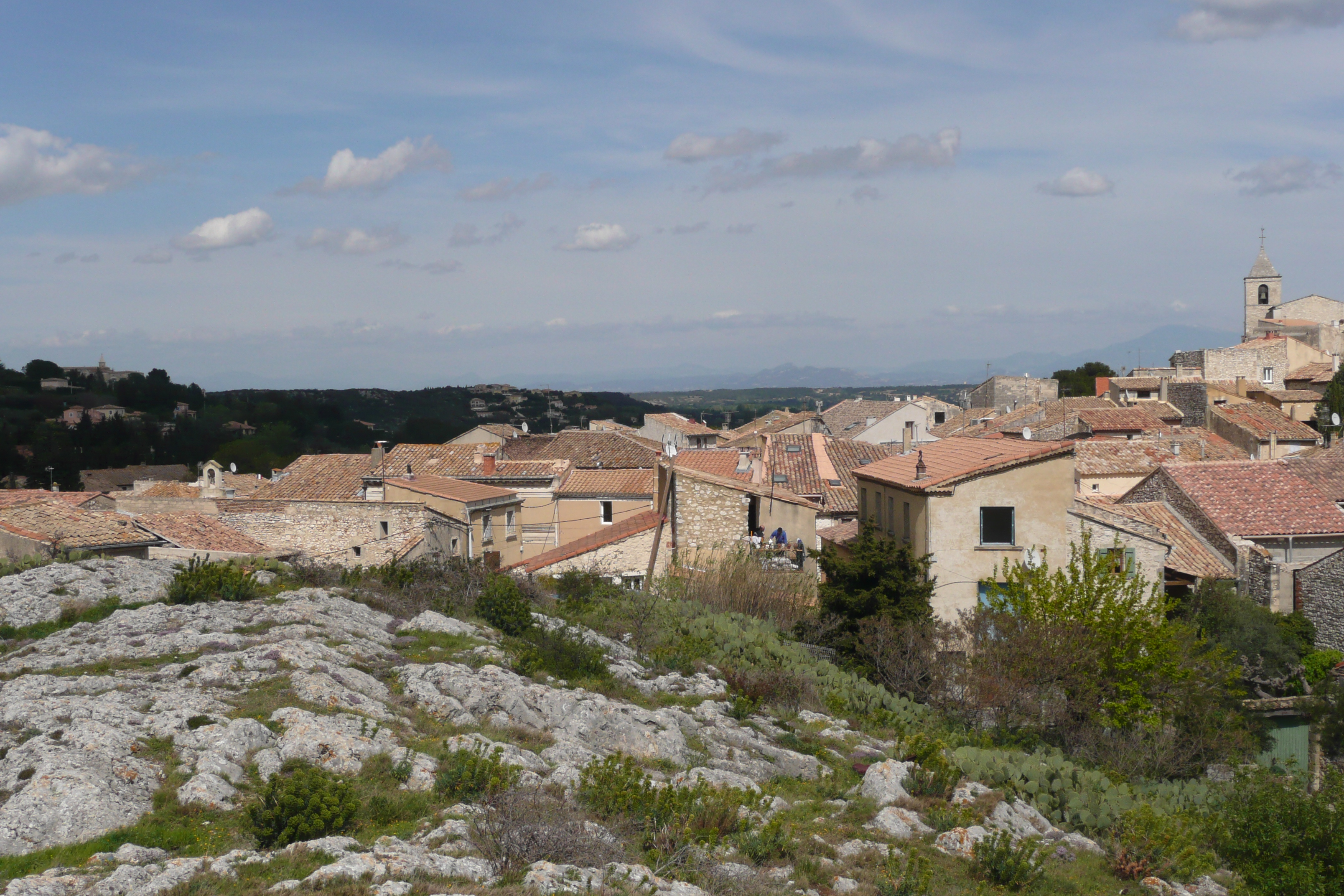 Vue sur le village à Rochefort-du-Gard.